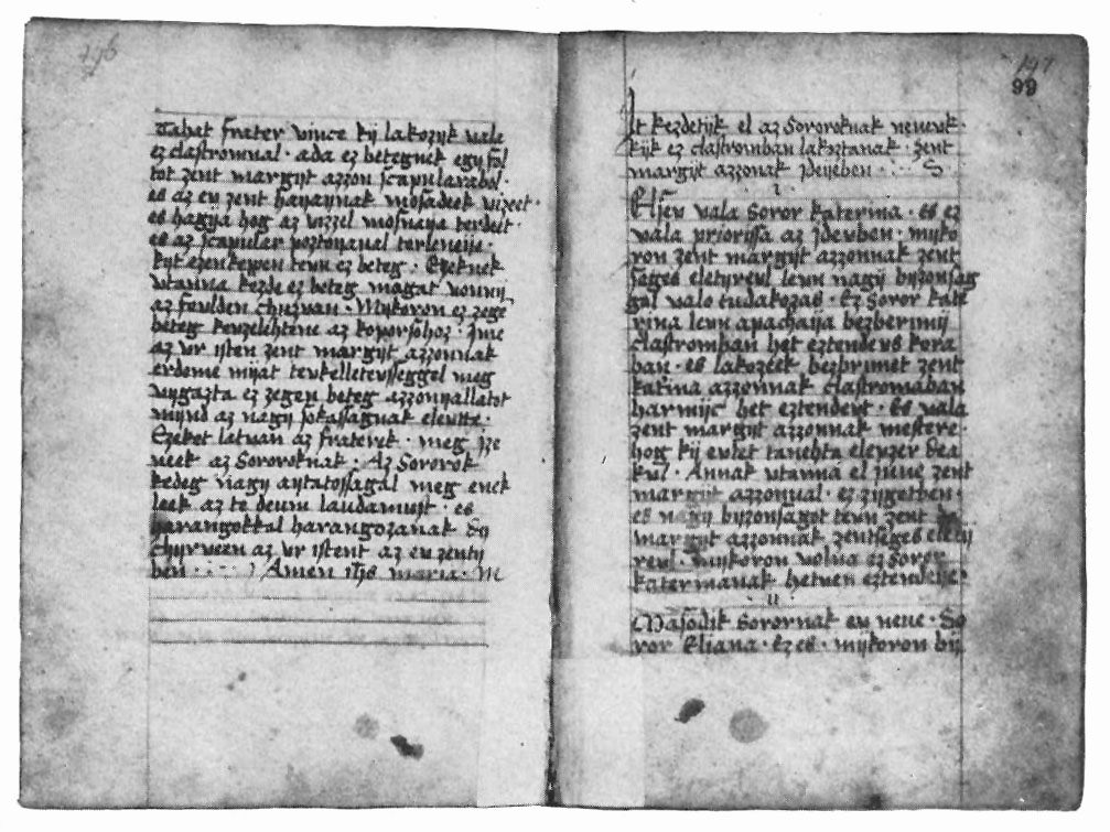 Margit-legenda kódexének két lapja